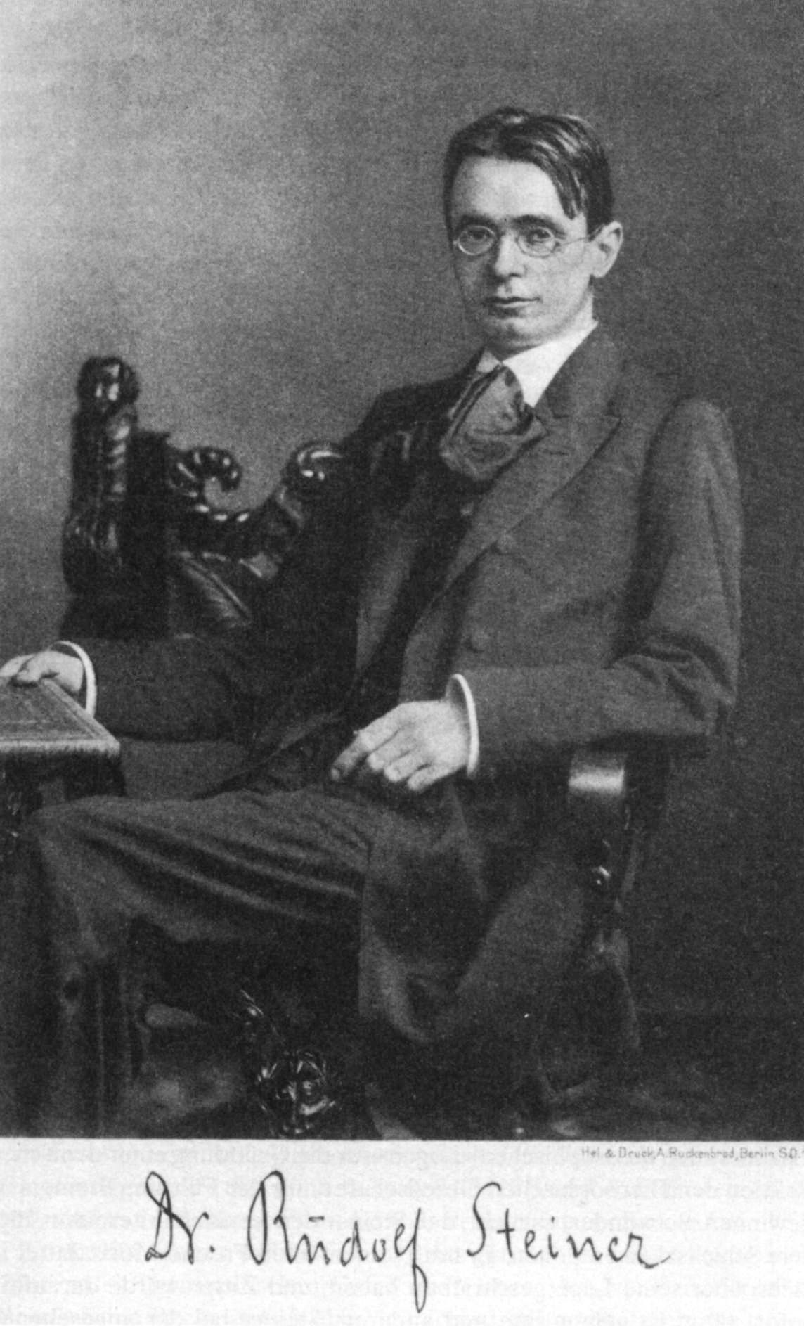 Rudolf Steiner im Jahre 1900 (Angabe siehe Quelle)